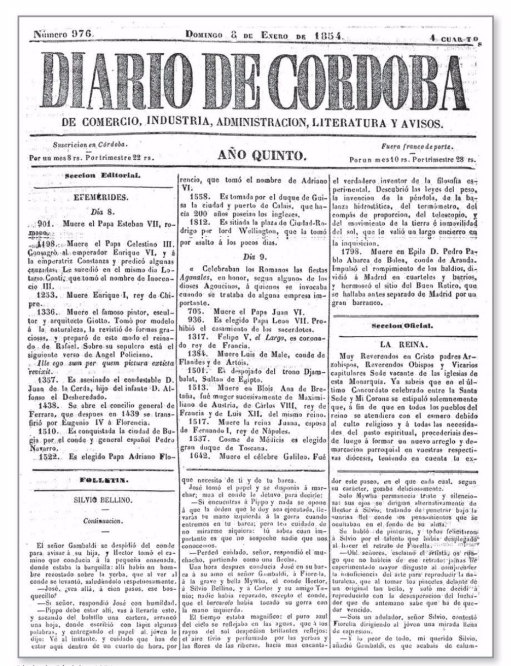 Diario de Córdoba, 8 de enero de 1854.